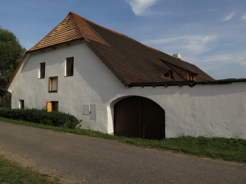 Usedlost čp. 43, Řepešín 43, Řepešín.